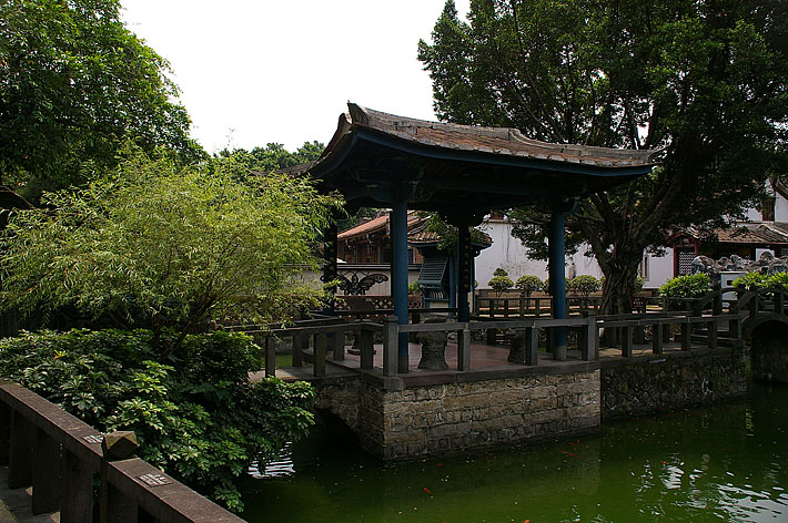 臺灣臺北縣板橋市林本源園邸一景。Bân-lâm-gú: Tâi-uân Tâi-pak-kuān Pán-kiô-tshī Lîm Pún-guân hn̂g-té it-kíng.